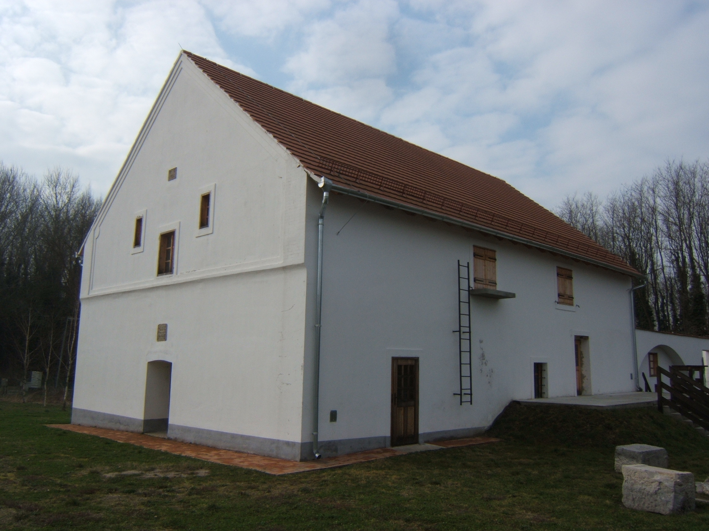 Péterhida, vízimalom